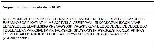 NPM1 seq